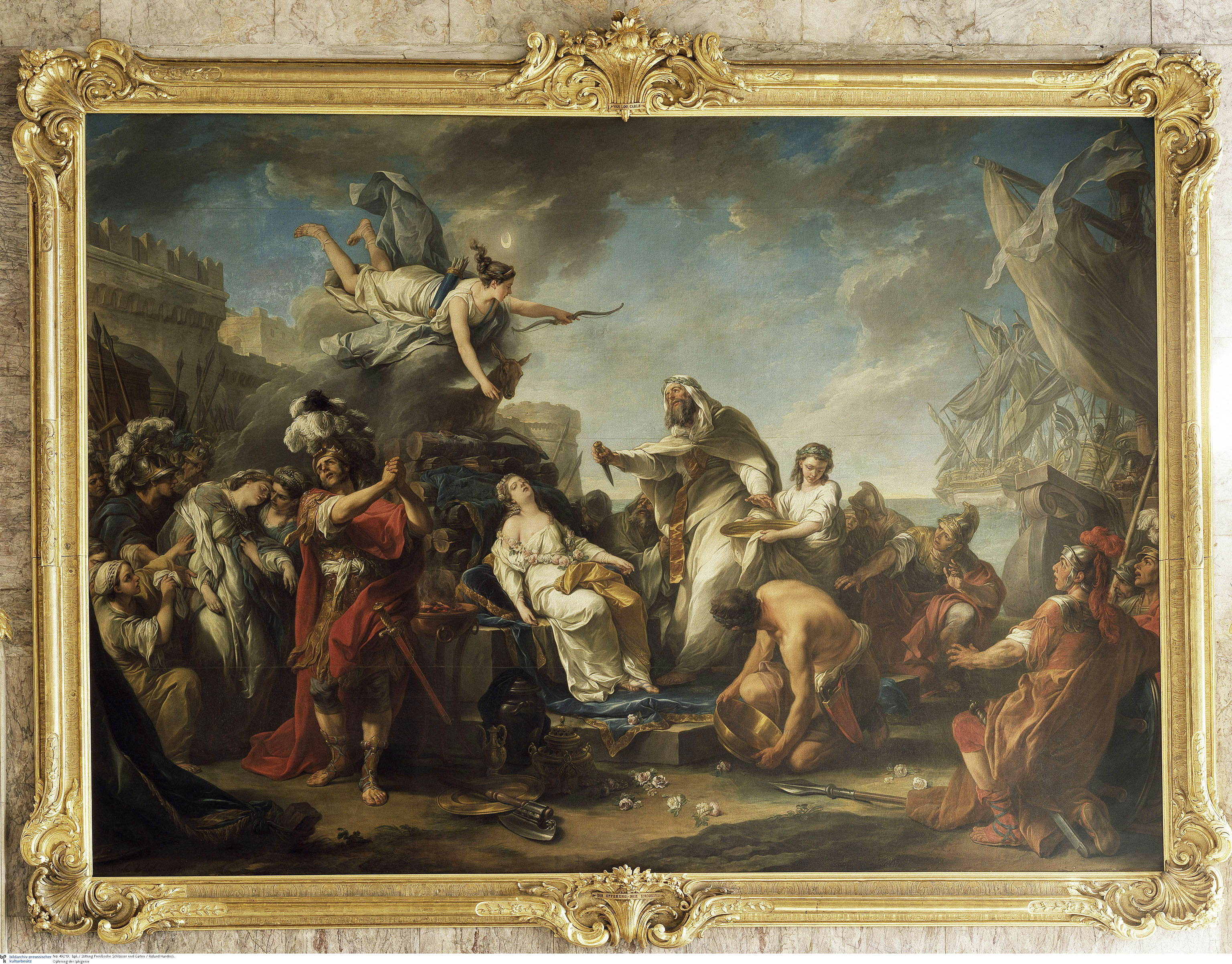 Gemälde, Öl auf Leinwand (1757) von Carle Van Loo [1705 - 1765]; Bildmaß 426 x 613 cm; Inventar-Nr.: GK I 5230; Person: Iphigenie, Älteste Tochter des Agamemnon in der griechischen Mythologie; Systematik:Personen/Antike/Mythologie/Iphigenie